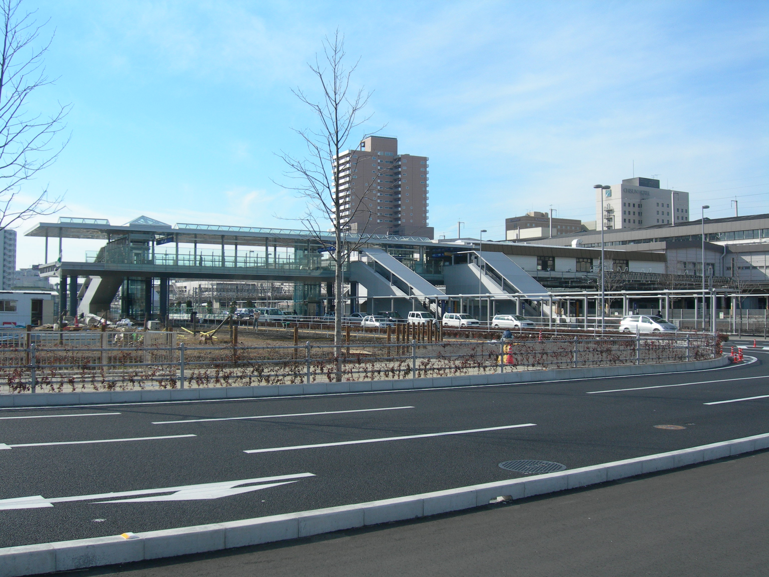 宇都宮駅東口(2009-1-27現在の様子)